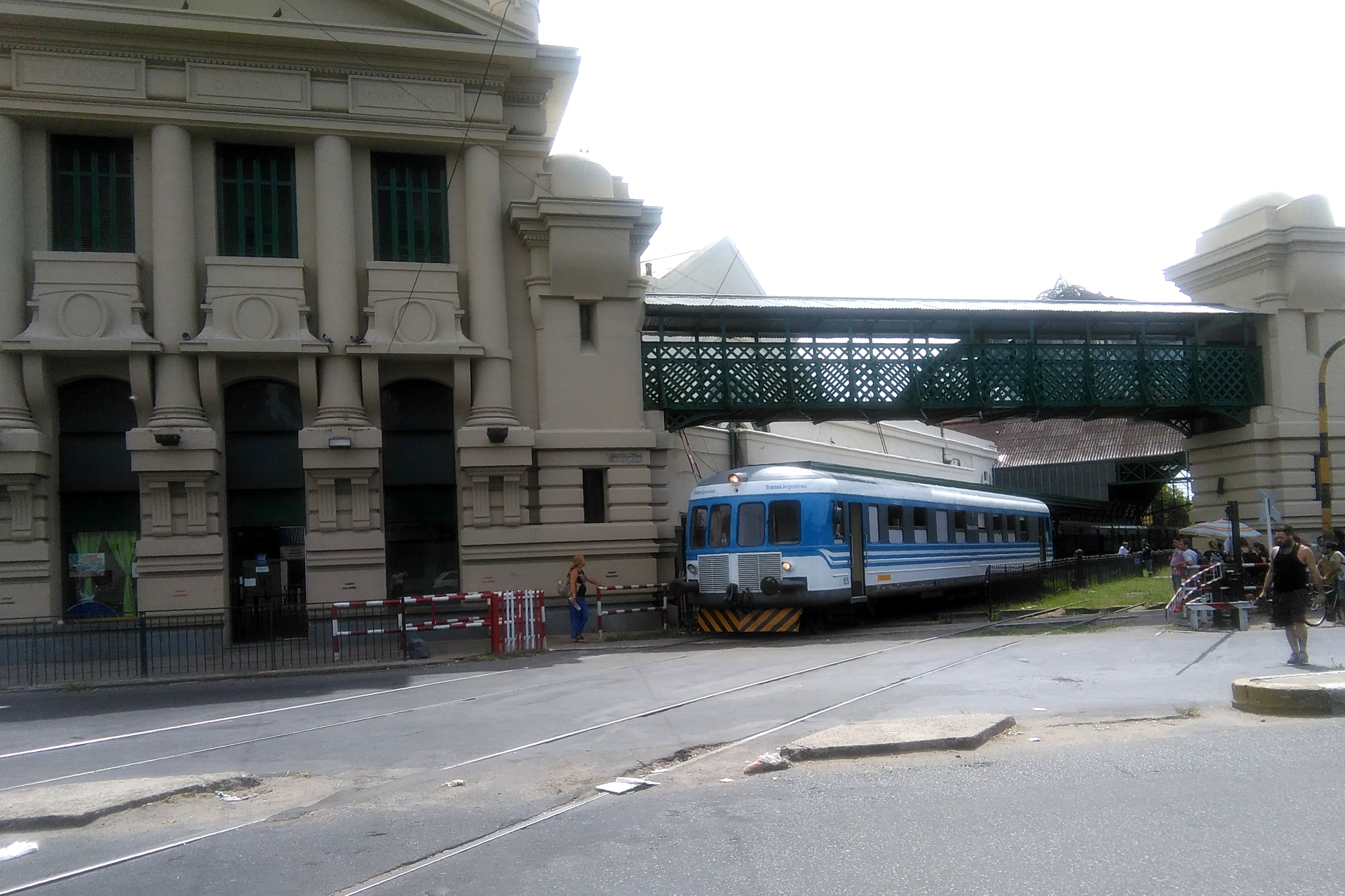 Tren Universitario de La Plata